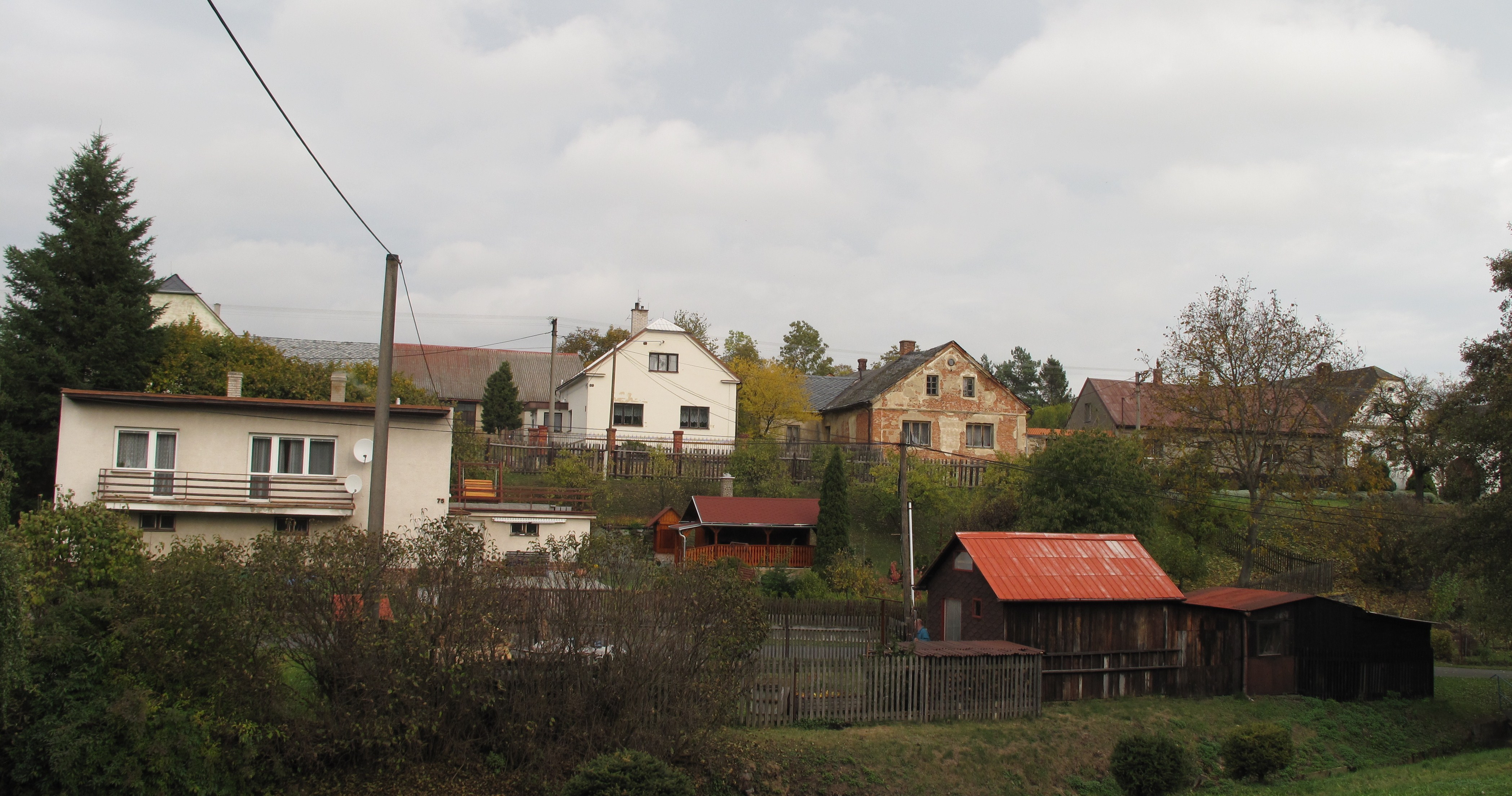 Bohdanovice. Okres Opava, Česká republika.